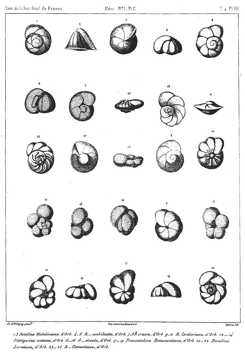 Lámina de foraminíferos. Lámina III de: Orbigny, Alcide d'(1840) "Mémoire sur les foraminifères de la craie blanche du bassin de Paris". Mémoires de la Société Géologique de France, 1ère série, IV(1): 1-51, IV lám.